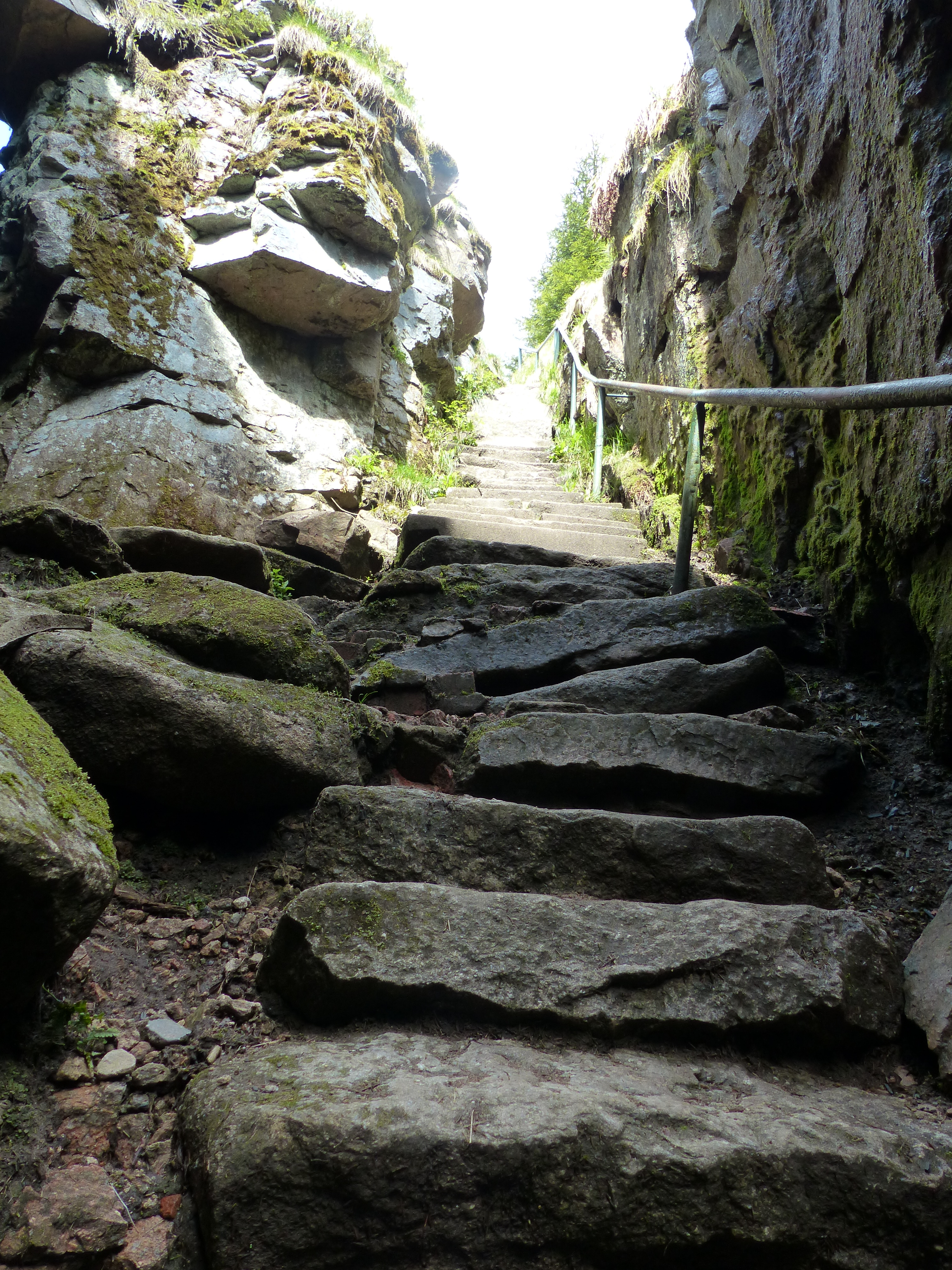 Blatenský vrch, Plattenberg